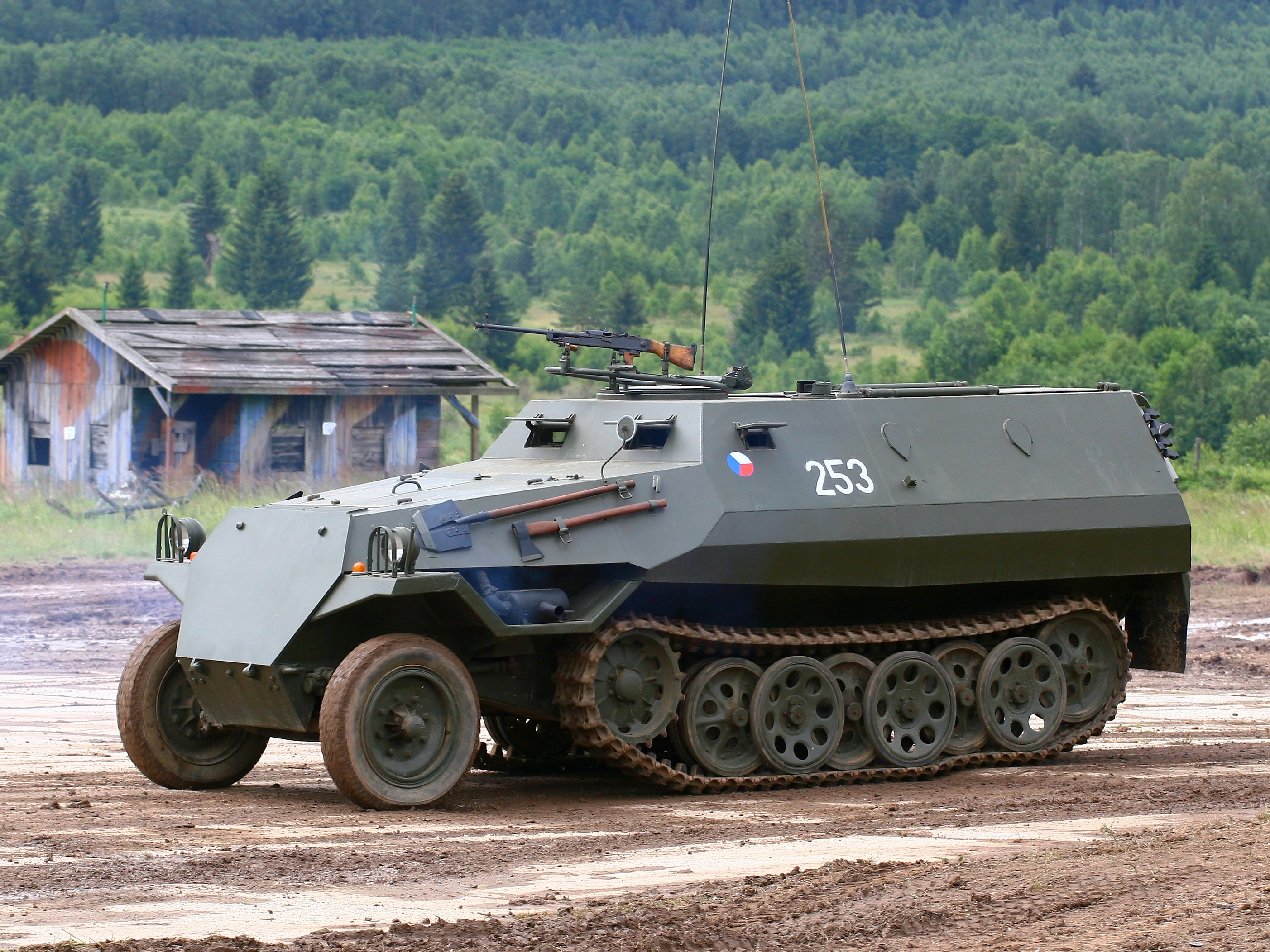 Vojenská technika zaznamenaná při dynamických ukázkách na Dni pozemního vojska BAHNA 2018, který pořádá Velitel společných sil a Nadace pozemního vojska AČR.